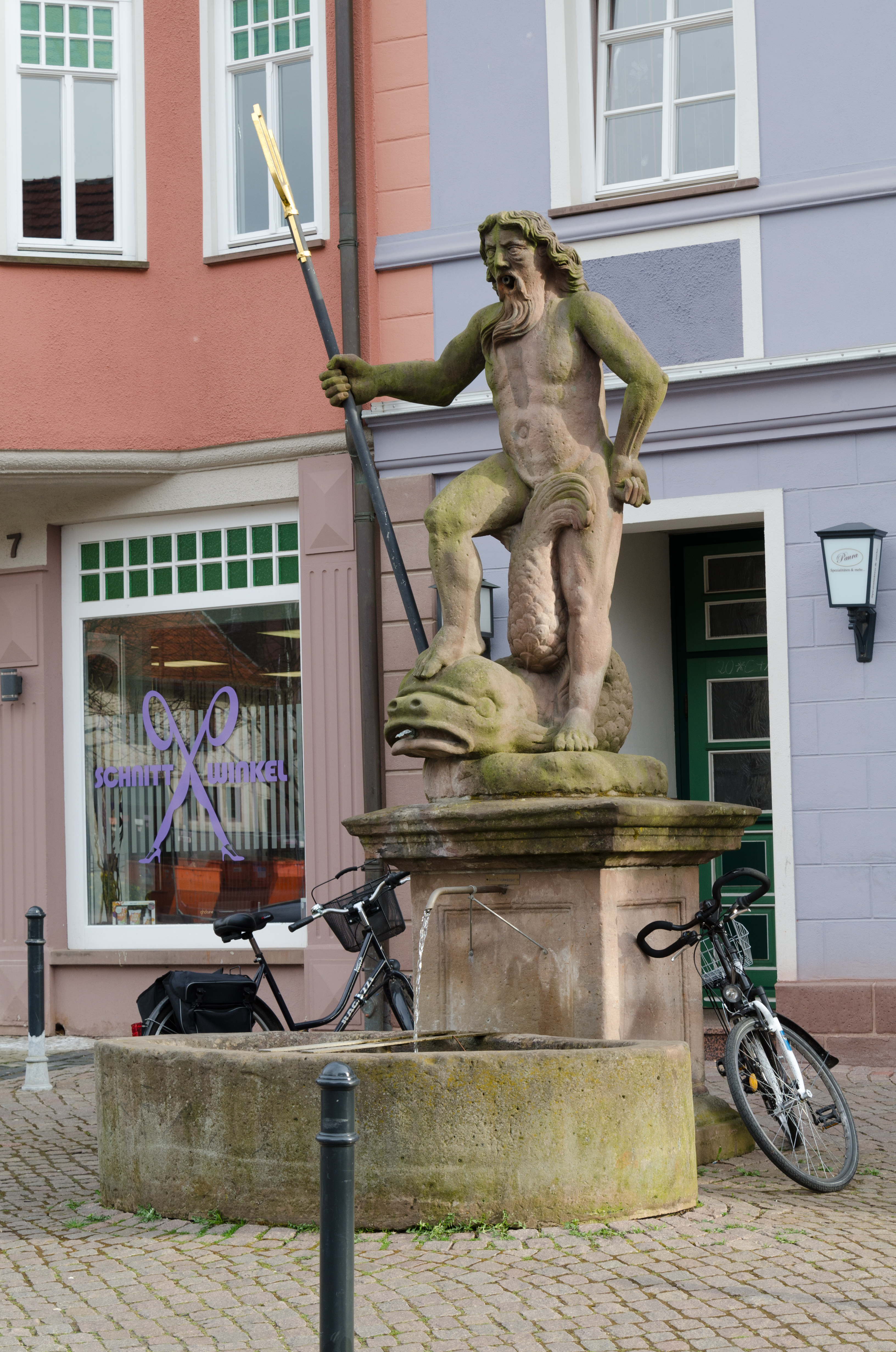 Heilbad Heiligenstadt, Marktplatz, Neptunbrunnen